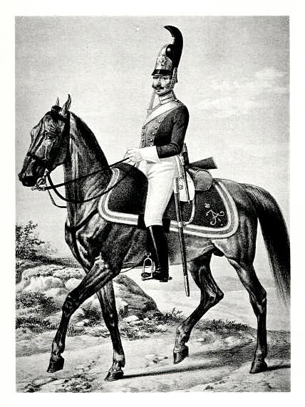 Рядовой каргопольского драгунского полка, 1816—1817 гг. Это изображение было использовано для иллюстрирования статьи «Каргопольский, 5-й драгунский, полк» опубликованной в двенадцатом томе «Военной энциклопедии», который был издан книгоиздательским товариществом И. Д. Сытина в 1913 году в столице Российской империи городе Санкт-Петербурге.